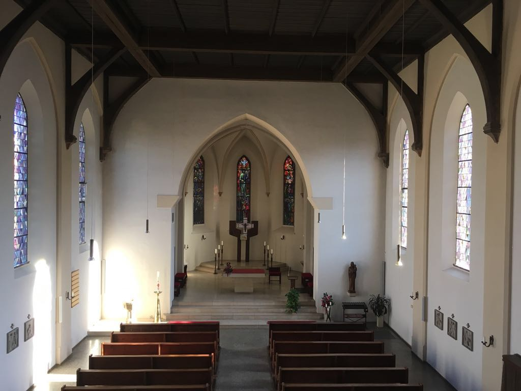 Kirchenraum von St. Bonifatius